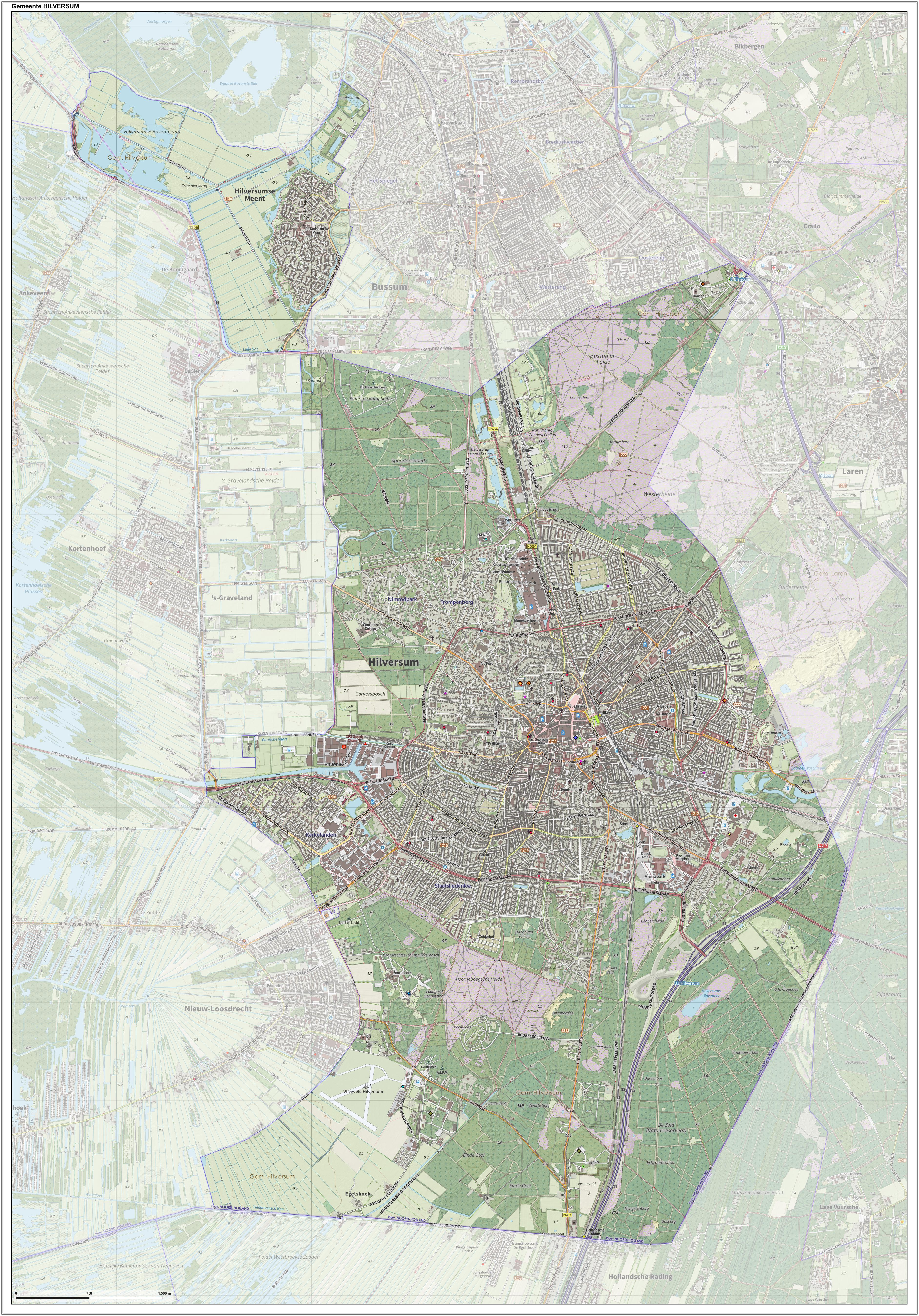 Topografische gemeentekaart. Resolutie: 400 pixels/km. Kaartbeeld samengesteld uit de open geodata van de Top10NL en Top25namen (Kadaster), Creative Commons-BY licentie. Gebouwvlakken uit open geodata BAG extract. Wegen uit de OpenStreetMap, OpenStreetMap community. Reliëfschaduw uit de Actuele Hoogtekaart AHN2. Samenstelling en kleurenschema: Jan-Willem van Aalst, met QGIS. Zie ook de Legenda.